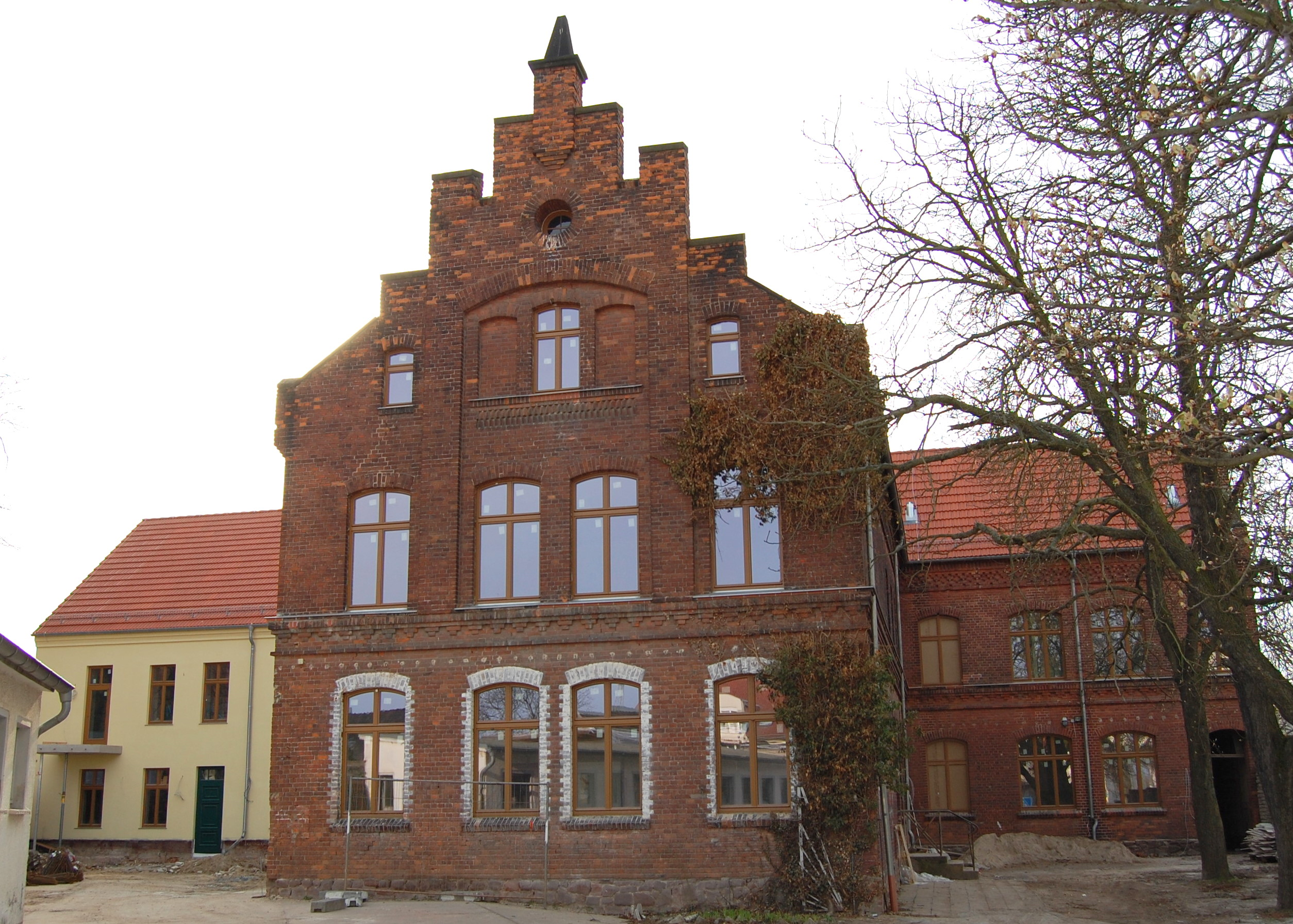 Alte Schule Salbke, Hofseite, während der Sanierung